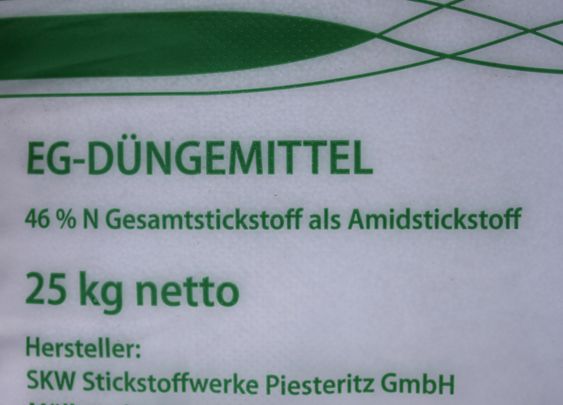 Beschriftung auf einem Sack Harnstoff (46 % N Gesamtstickstoff als Amidstickstoff)